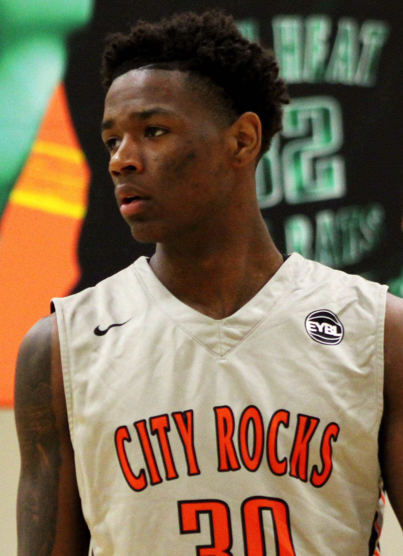 Nahziah Carter 2_wm